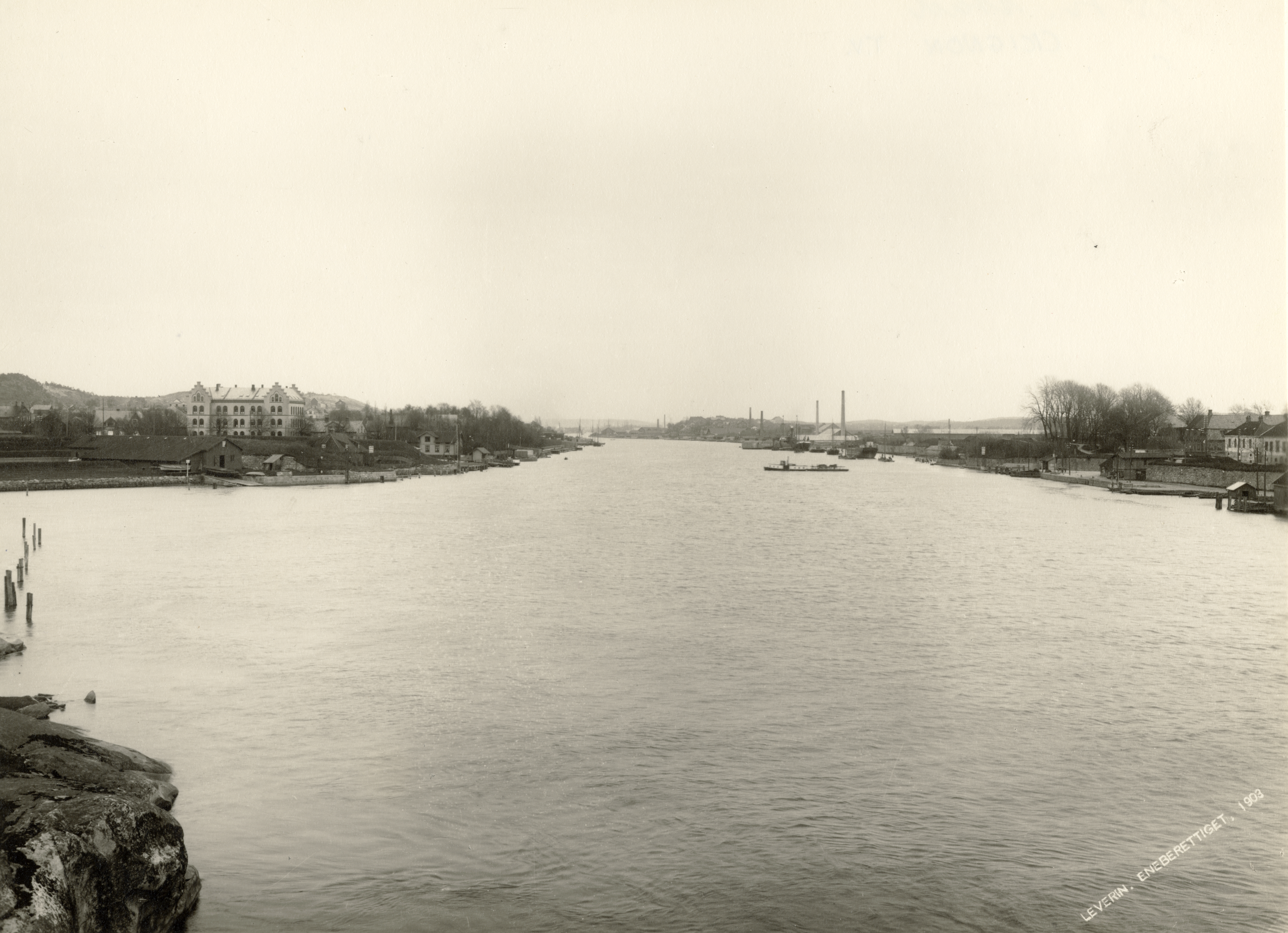 Fredrikstad i Fredrikstad, Østfold T.v. Cicignon med festningsverk som nå er forsvunnet.